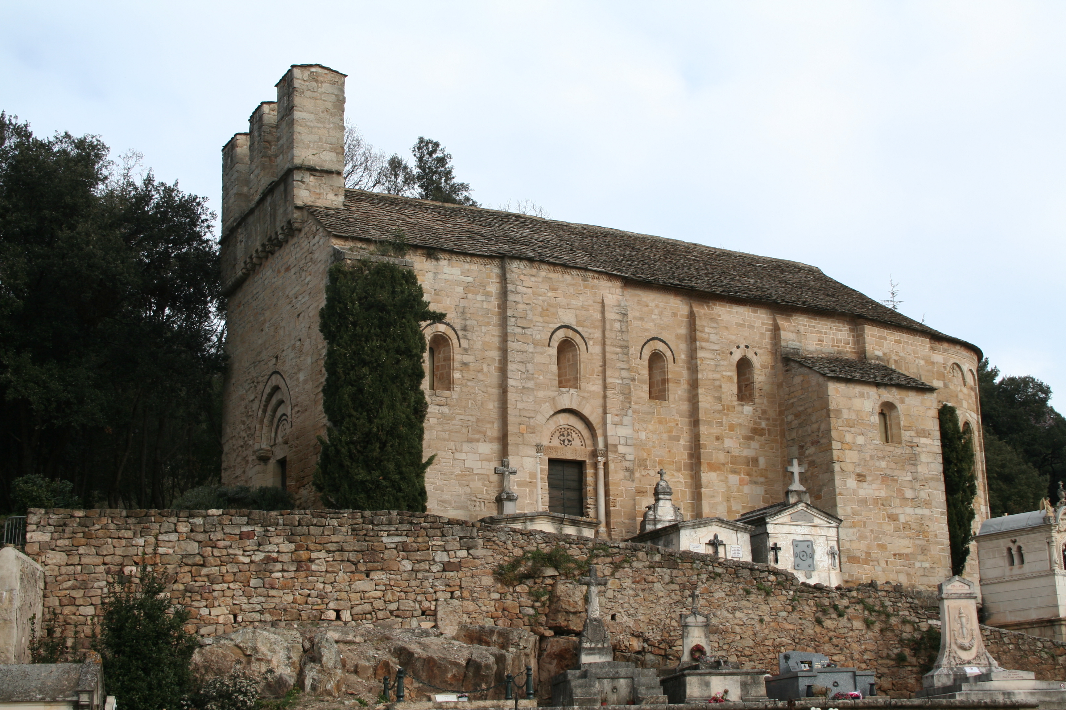 Saint-Pierre-de-Rhèdes (Lamalou-les-Bains - Hérault) - église romane - façade méridionale.